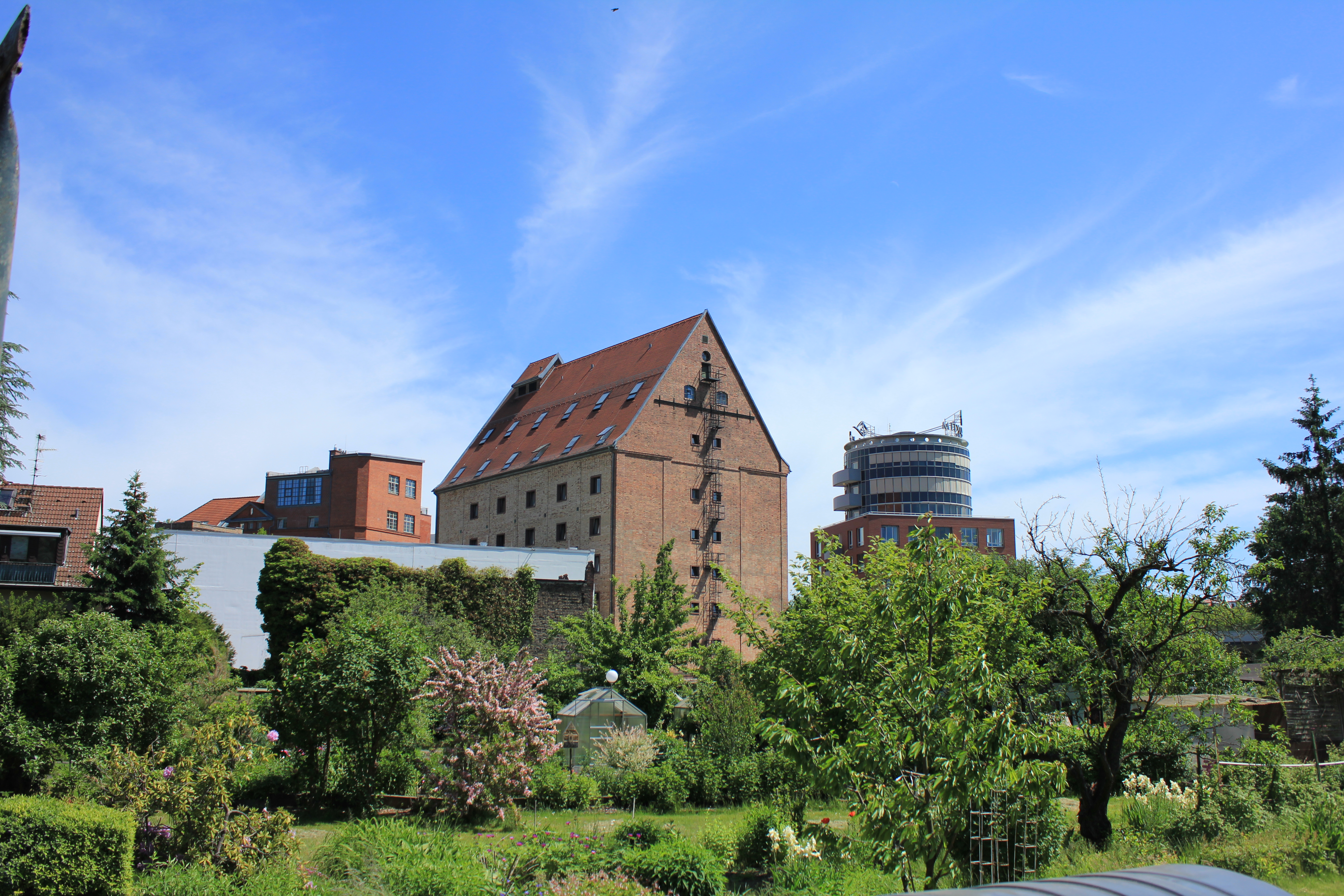 Humboldtmühle